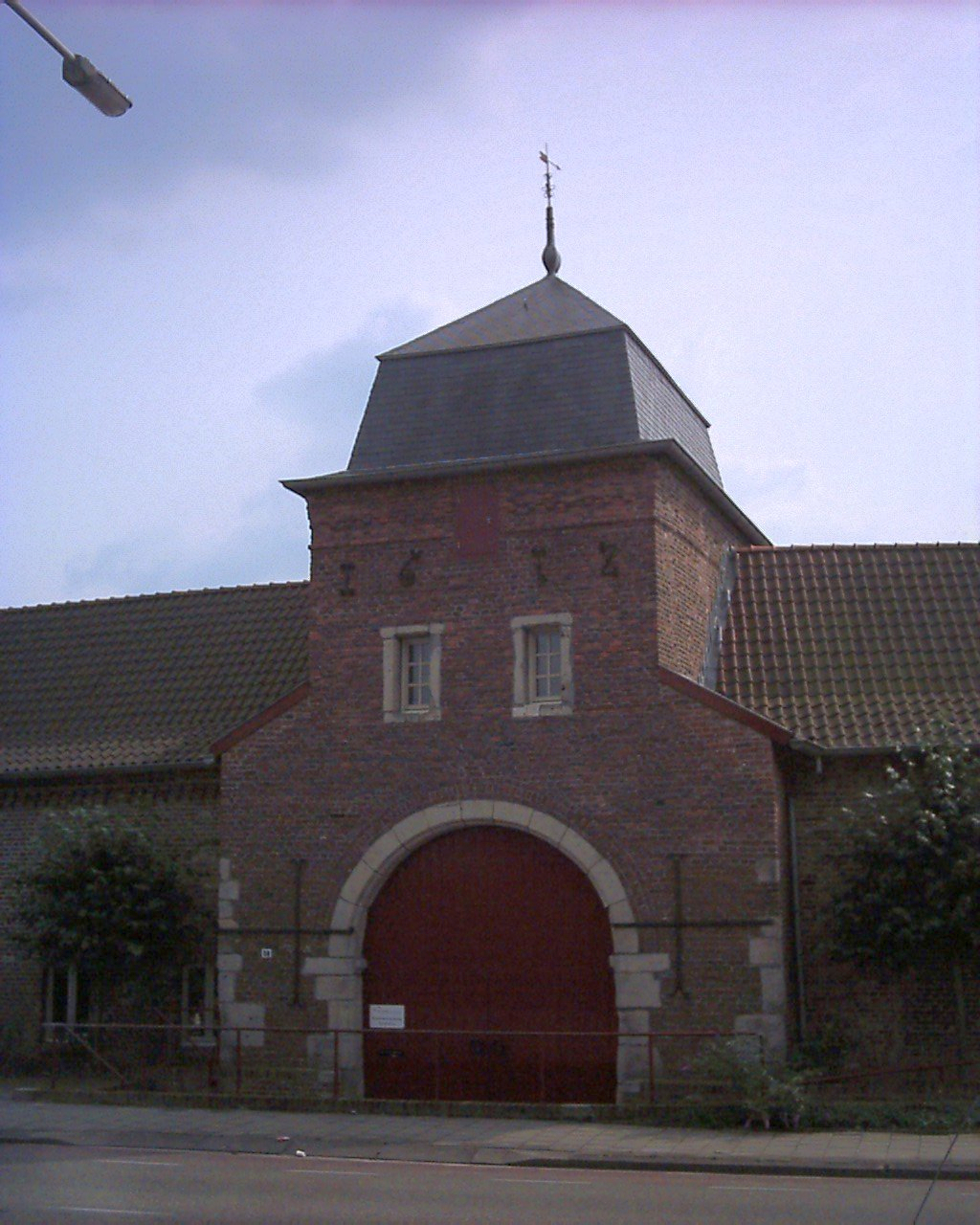 Poortgebouw van Kasteel Passarts-Nieuwenhagen, Passartweg 56 Heerlen, Limburg, Nederland